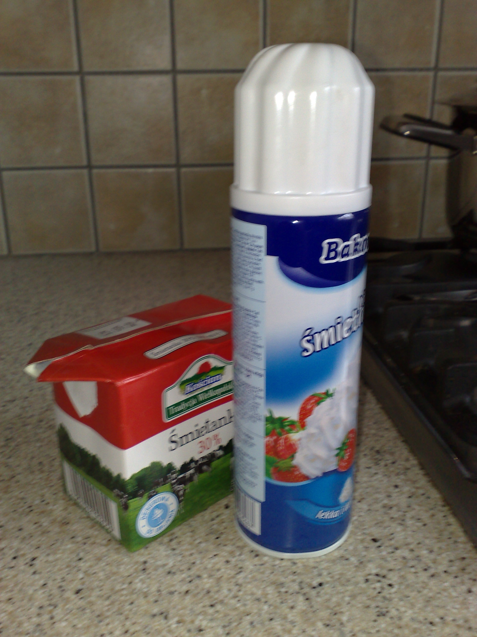 różne typy śmietany